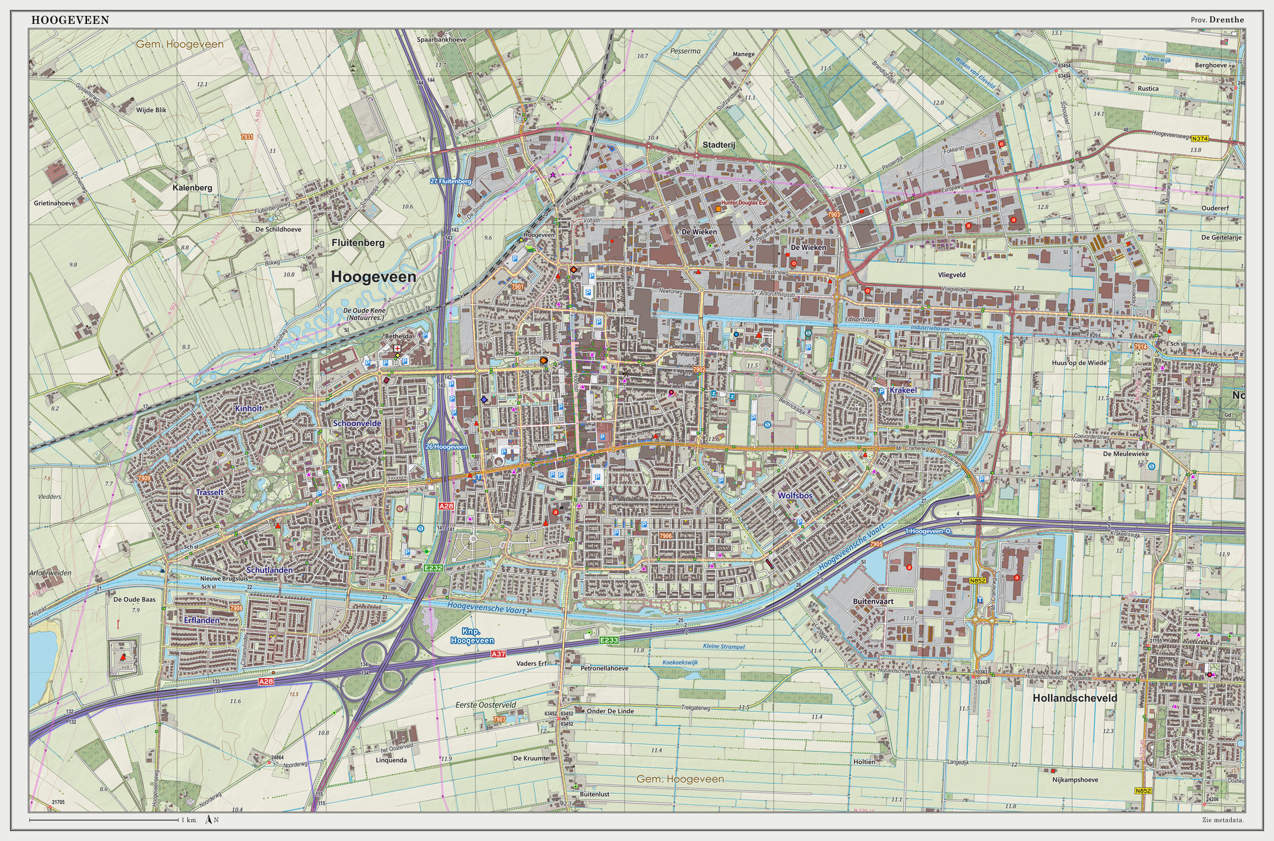 Topografische kaart van Hoogeveen (woonplaats). Resolutie: 300 pixels/km. Kaartbeeld samengesteld uit de open geodata van de Top10NL en Top25namen (Basisregistratie Topografie, Kadaster), Creative Commons BY licentie. Gebouwvlakken uit open geodata BAG extract. Wegen uit de OpenStreetMap, OpenStreetMap community. Schaduwreliëf uit de Actuele Hoogtekaart AHN2. Samenstelling en kleurenschema: Jan-Willem van Aalst, met QGIS2. Zie ook de Legenda.